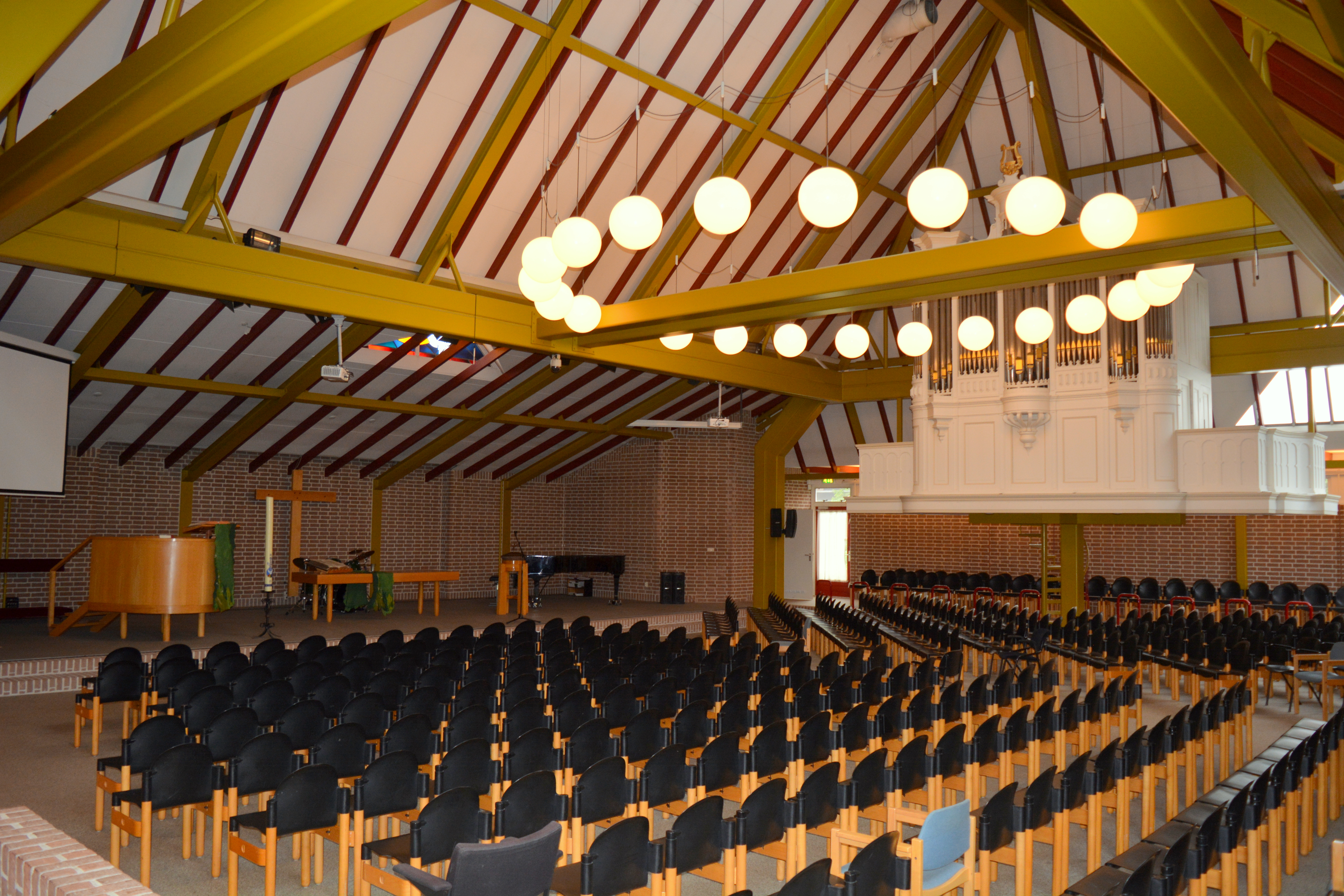 Leeuwarden, christelijk-gereformeerde Bethelkerk